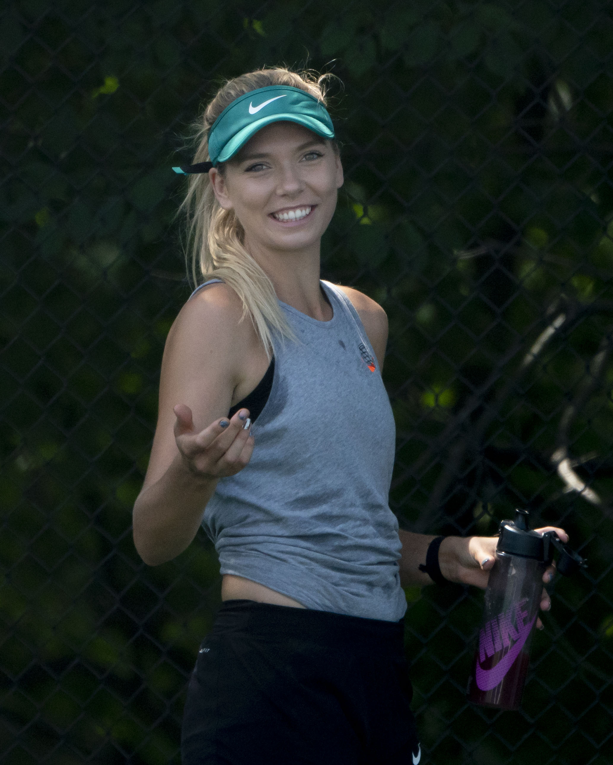 2018 Citi Open Tennis